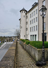 gghg